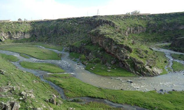 Օշականի ձորը